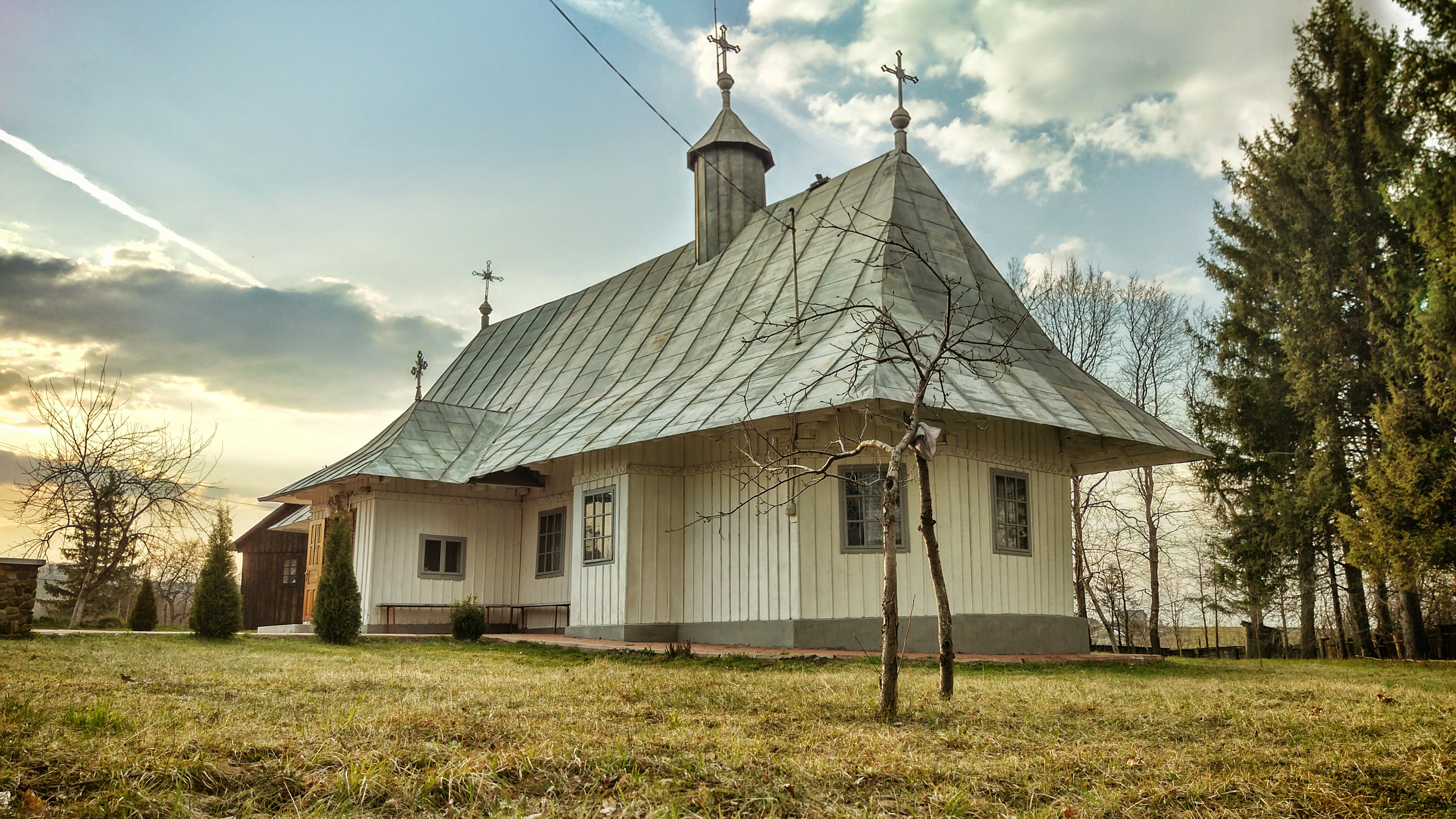 Biserica de Lemn - Biserica "Sf. Dumitru" din Călinești-Enache, județul Suceava - fotografie realizata la apus